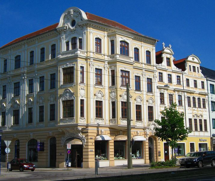 Häuser an der Ecke Breiter Weg / Himmelreichstraße in Magdeburg